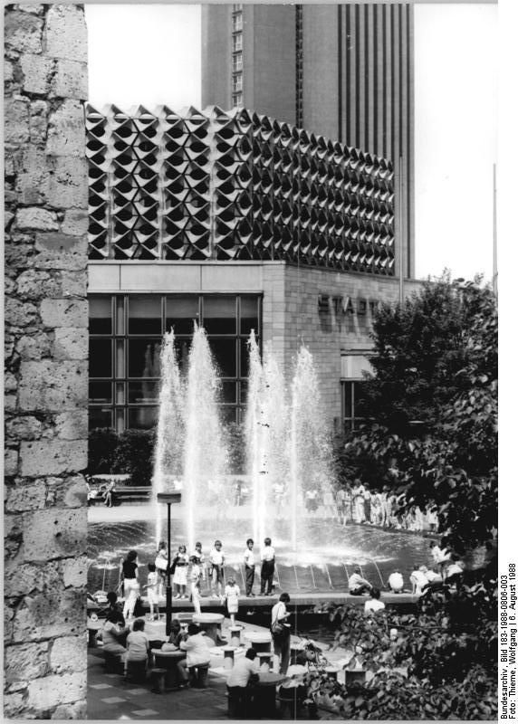 Chemnitz, Stadthalle, Springbrunnen ADN-ZB Thieme 6.8.88 Karl-Marx-Stadt: Vorbereitung VIII. Pioniertreffen vom 14. bis 21. August 1988 - Die Wasserspiele vor der Stadthalle der Gastgeberstadt werden den jungen Gästen Entspannung und erholsame Minuten bieten, Siehe auch Motive 1 und 2 N.